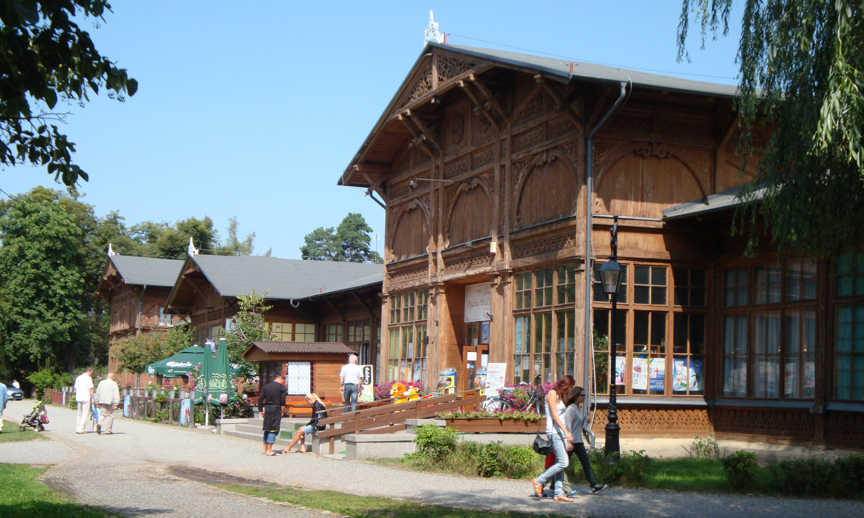 Ciechocinek, pijalnia wód mineralnych, 1883-1885